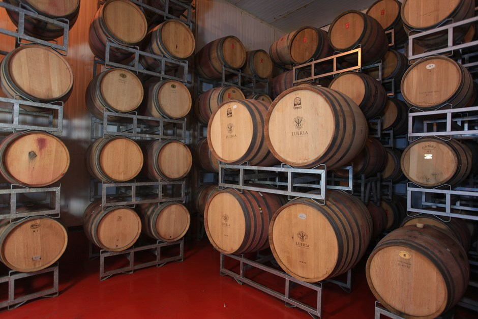 חדר החביות ביקב לוריא